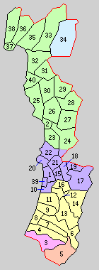 石川県羽咋郡の町村制施行時の町村。